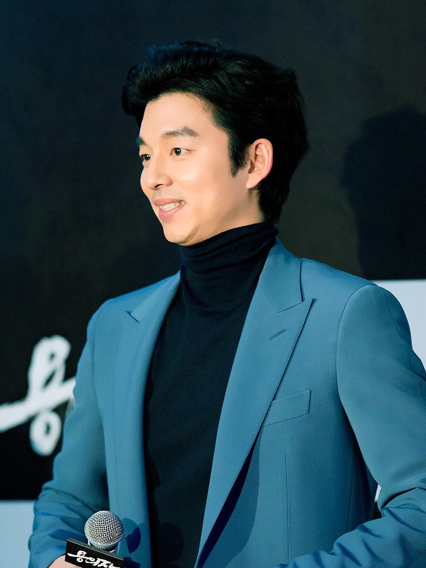 131217-용의자-VIP시사회공유